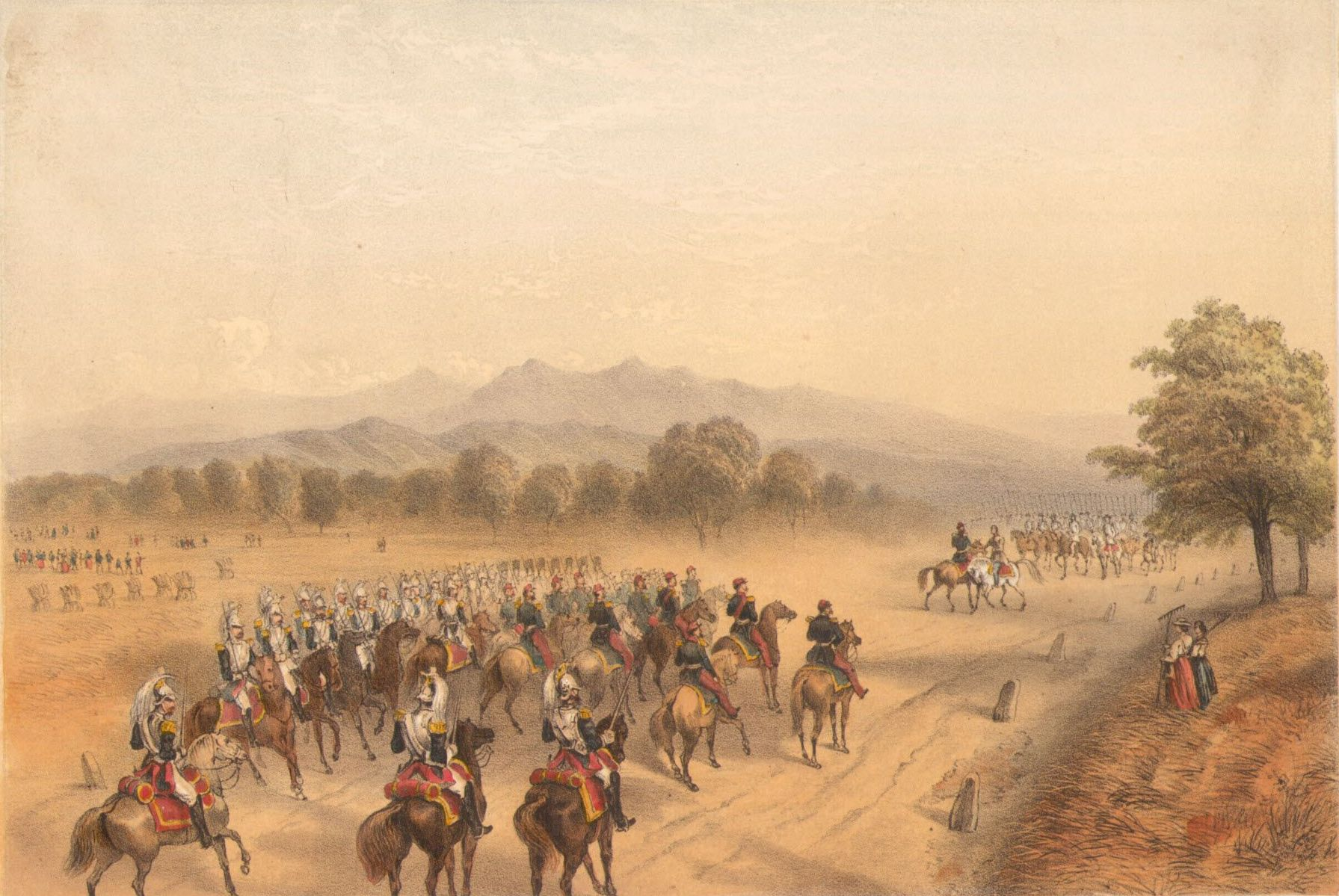 Napoleone III e Francesco Giuseppe si incontrano presso Villafranca di Verona per mettere fine alla seconda guerra di indipendenza italiana (1859).